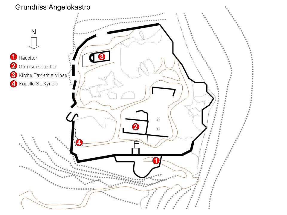 Grundriss der Festung Angelokastro, Korfu, Griechenland